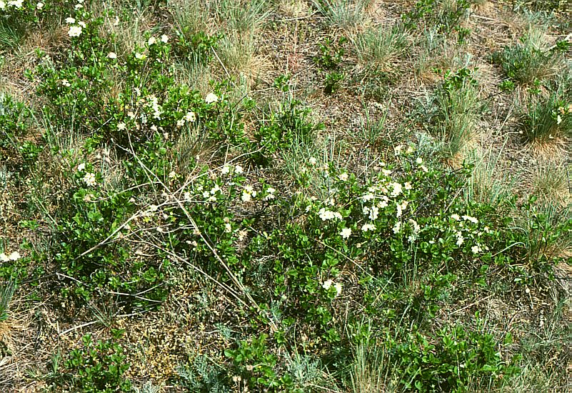 Zwerg-Weichsel (Prunus fruticosa), Rosengewächse (Rosaceae) - Österreich/Austria/Autriche: Niederösterreich, Ostrand des Waldviertels, „Kogelstein“ NNE Grafenberg bei Eggenburg